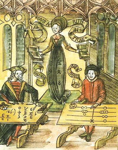 Typus Arithmeticae, aus der Margarita Philosophica (1504) des Kartäuserpriors Gregor Reisch Beschreibung: Pythagoras (rechts im Bild) und Boethius (links im Bild) tragen einen Wettstreit vor der personifizierten Arithmetica aus. Während Boethius die Aufgabe mit der moderneren Methode der „Rechnung mit der Feder“ – also mit indischen Ziffern – bereits gelöst hat und stolz dreinschaut, ist Pythagoras mit seiner „Rechnung auf der Linie“ noch beschäftigt. Das Mittelalter hielt, beide Male irrtümlich, diese Männer für die Erfinder der einen und der anderen Rechenweise.